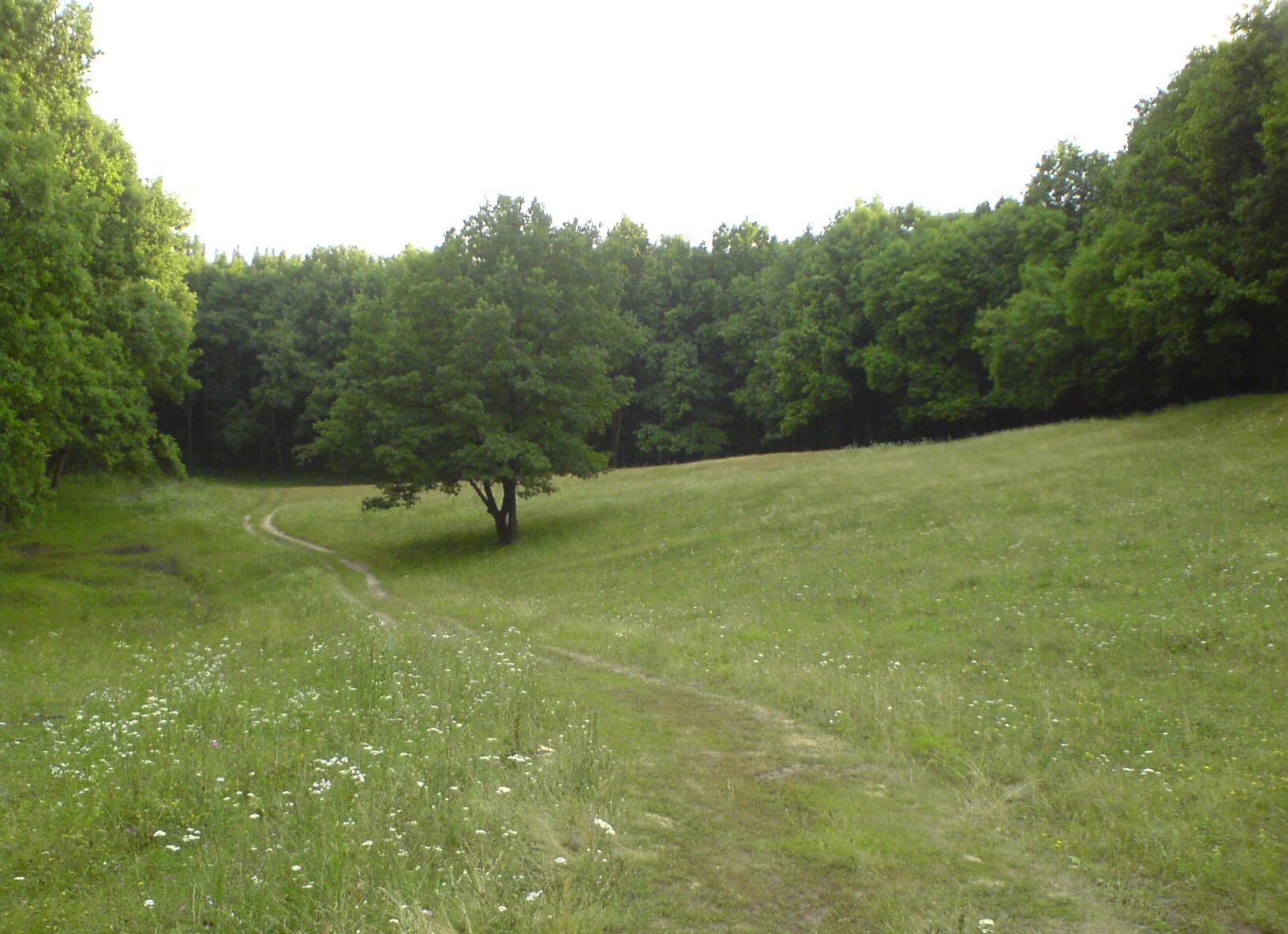 Поляна Партизанка в Любовском лесопарке, Харьковская область